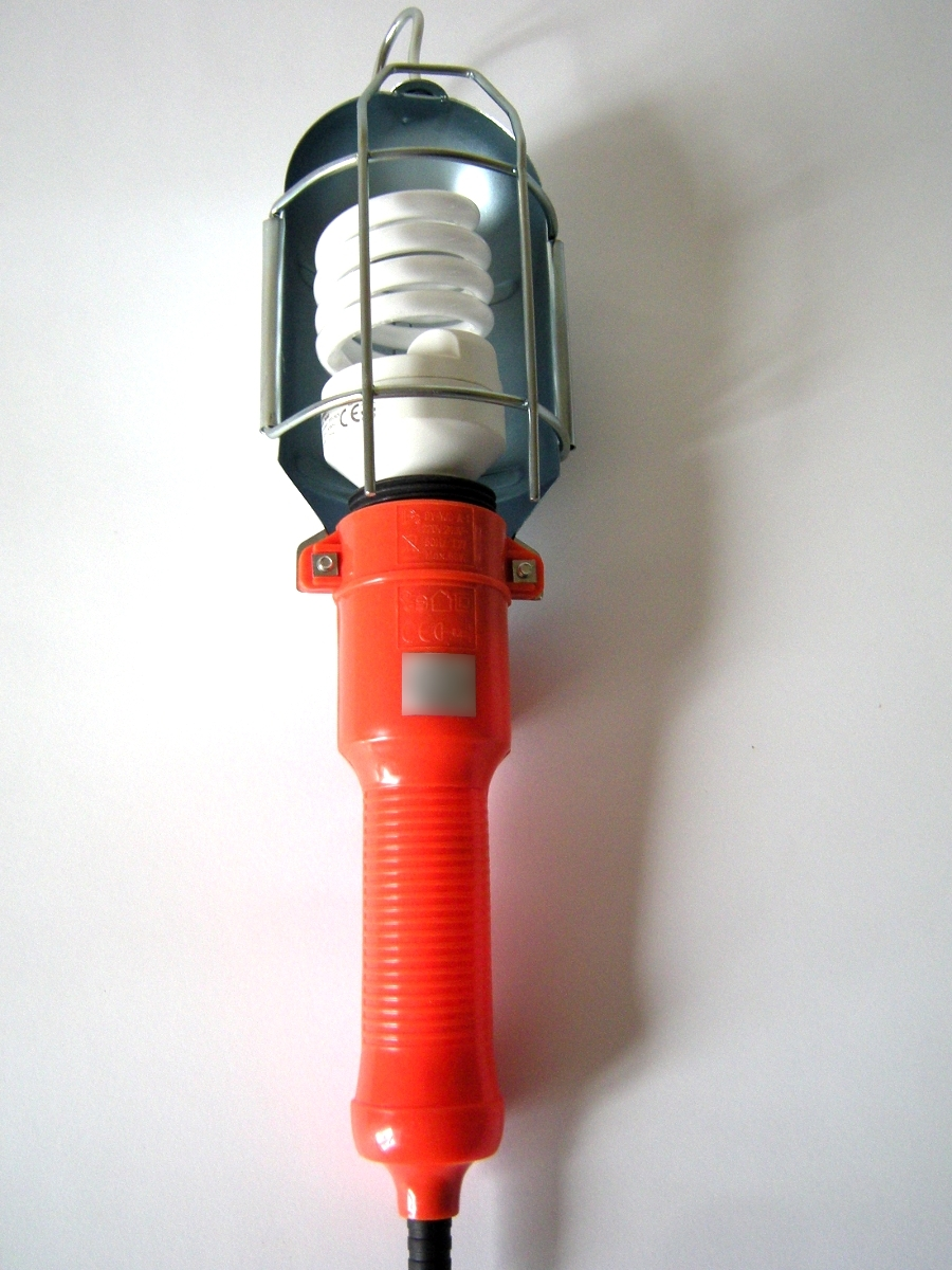 Lampada portatile con lampadina a risparmio energetico da 23 W di potenza